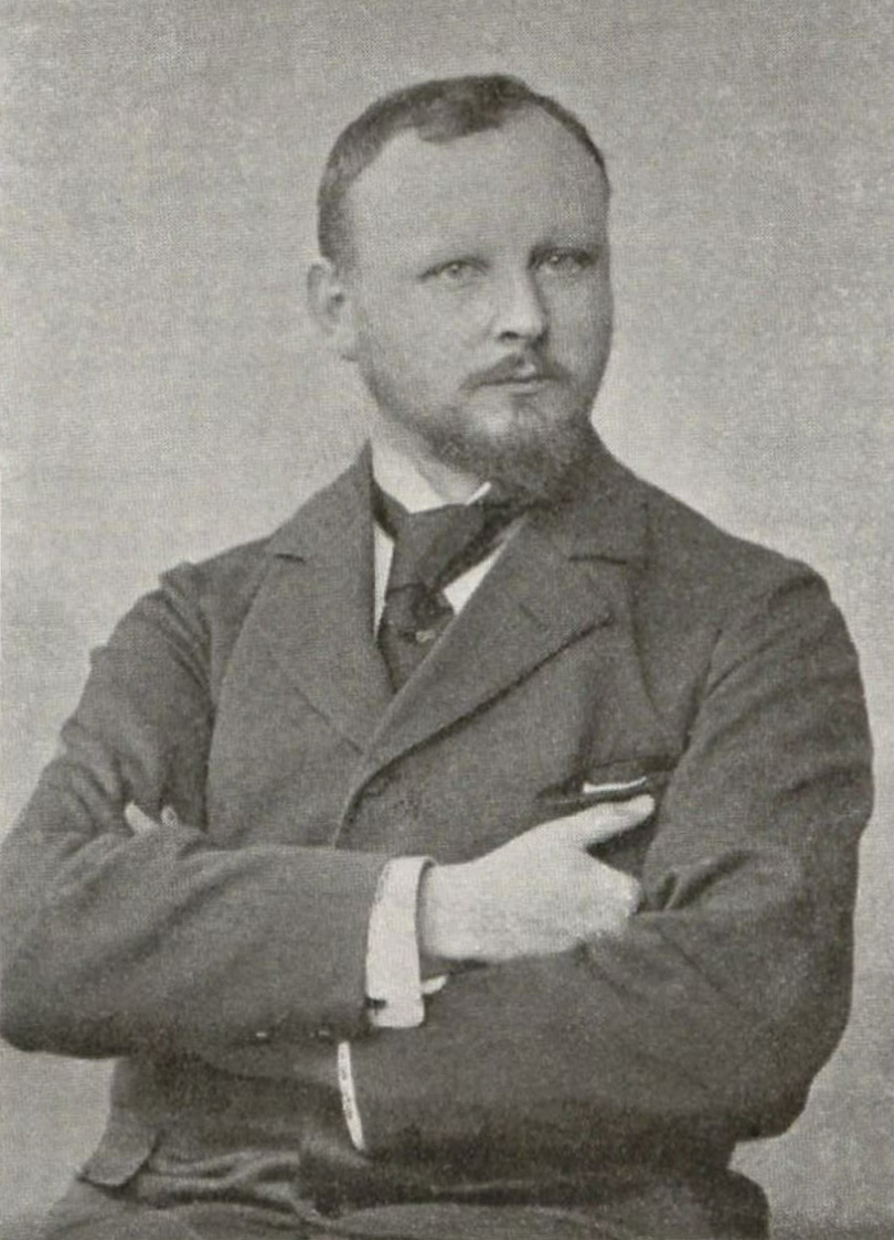 Carl Langhein (1872–1941) DescriptionGerman painter and lithographerDate of birth/death29 February 187226 June 1941Location of birth/deathHamburgHadamarAuthority control : Q46528113 VIAF: 64765139 ISNI: 0000000010443156[does not match ^%d%d%d%d %d%d%d%d %d%d%d%d %d%d%d[%dX]$ pattern] GND: 116724242 vor 1905 (digital etwas bearbeitet)